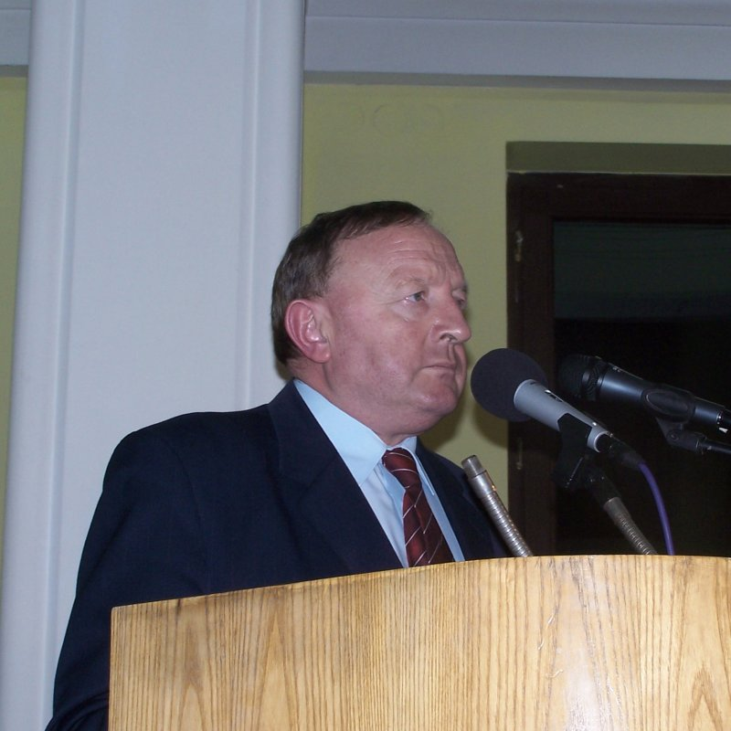 Stanisław Michalkiewicz, Warszawa